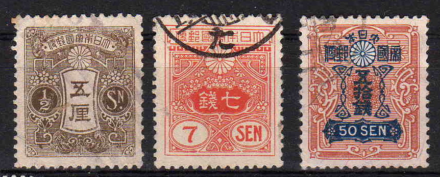 japanese stamp（日本の普通切手）田沢切手と呼ばれる大正時代の普通切手である。